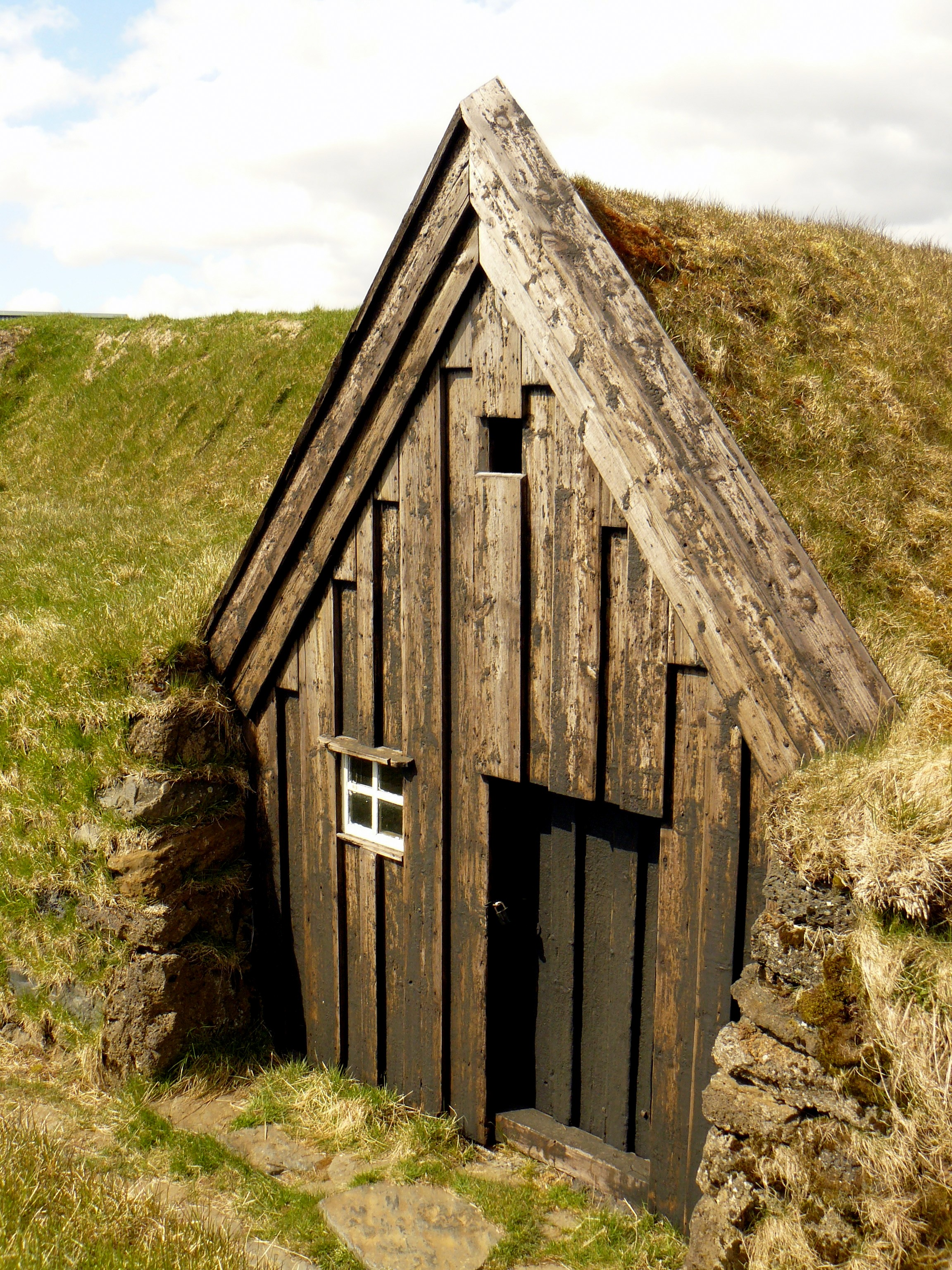 Bâtiment ancien en bois recouvert de tourbe à Keldur (Islande)